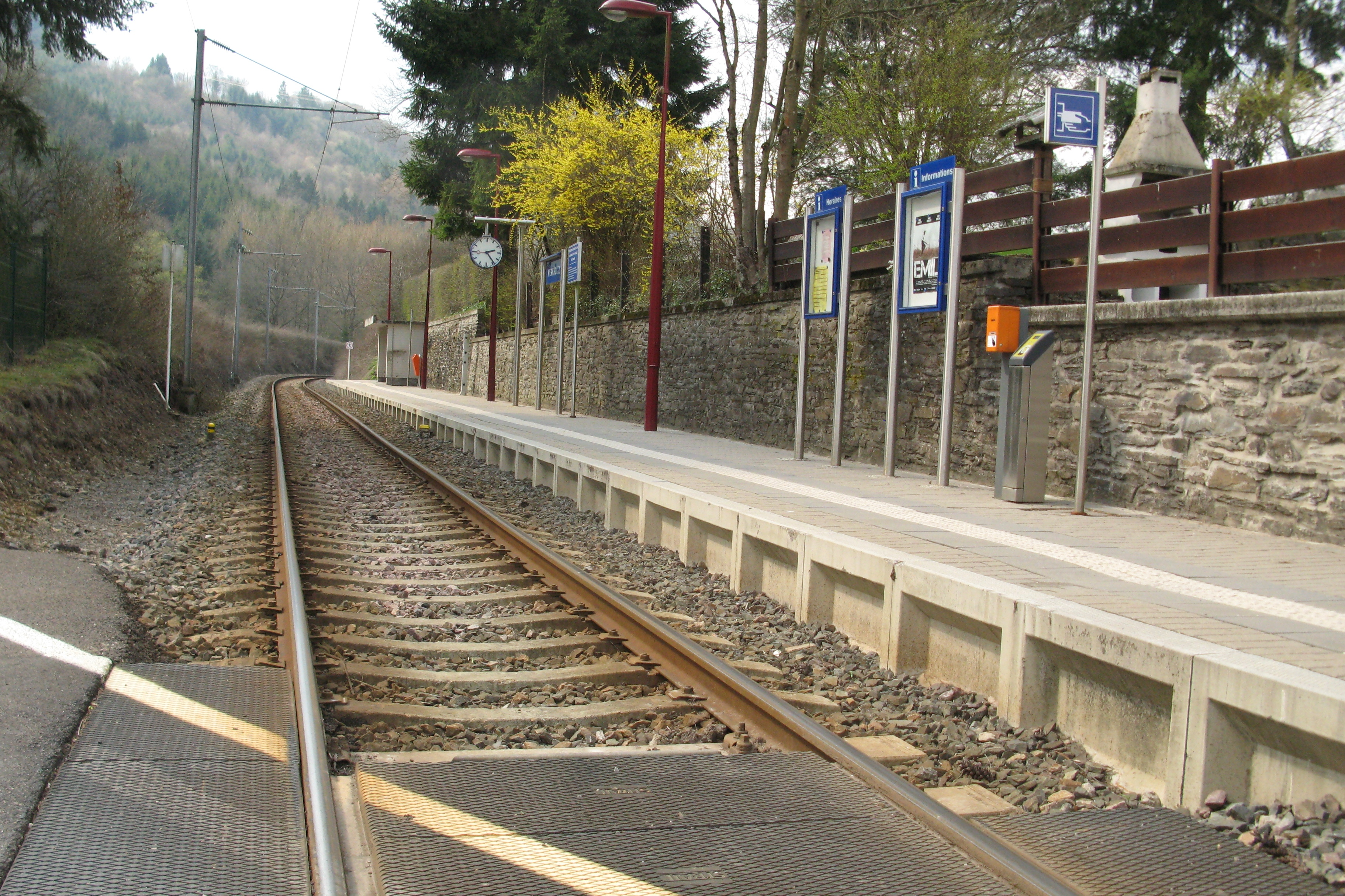 Vue op d'Gleiser an de Quai op der Mäerkelser Halt. Maerkels